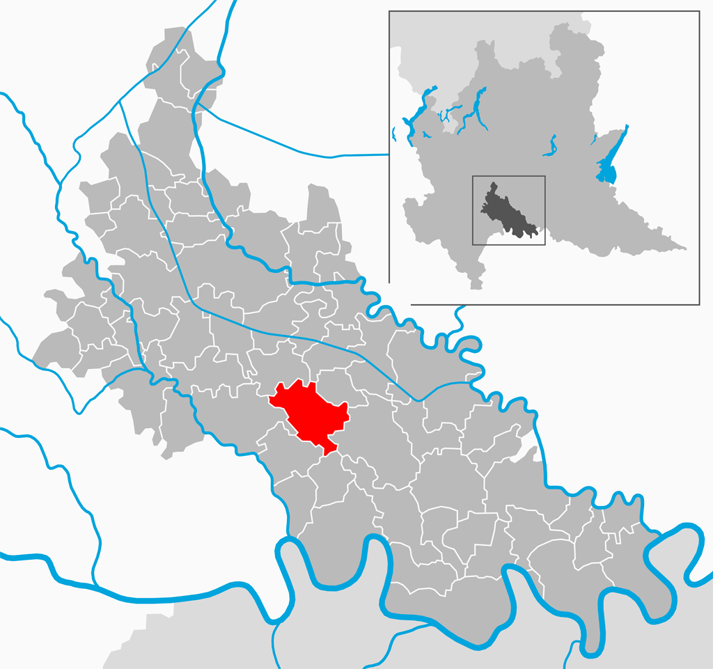 Il comune di Brembio nella provincia di Lodi